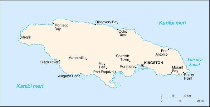 Jamaica kaart